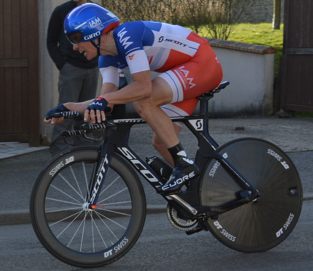 Sylvain Chavanel à Paris-Nice 2015